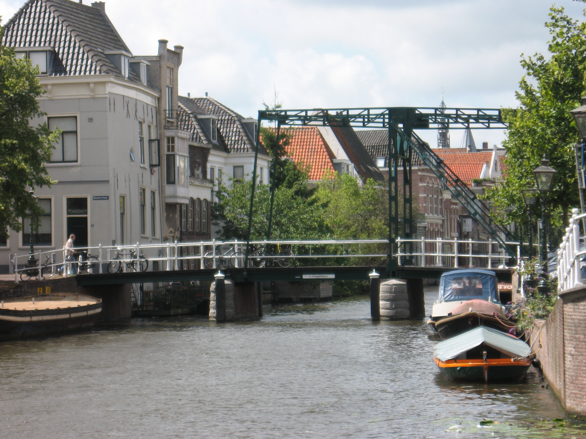 Kraaierbrug Leiden